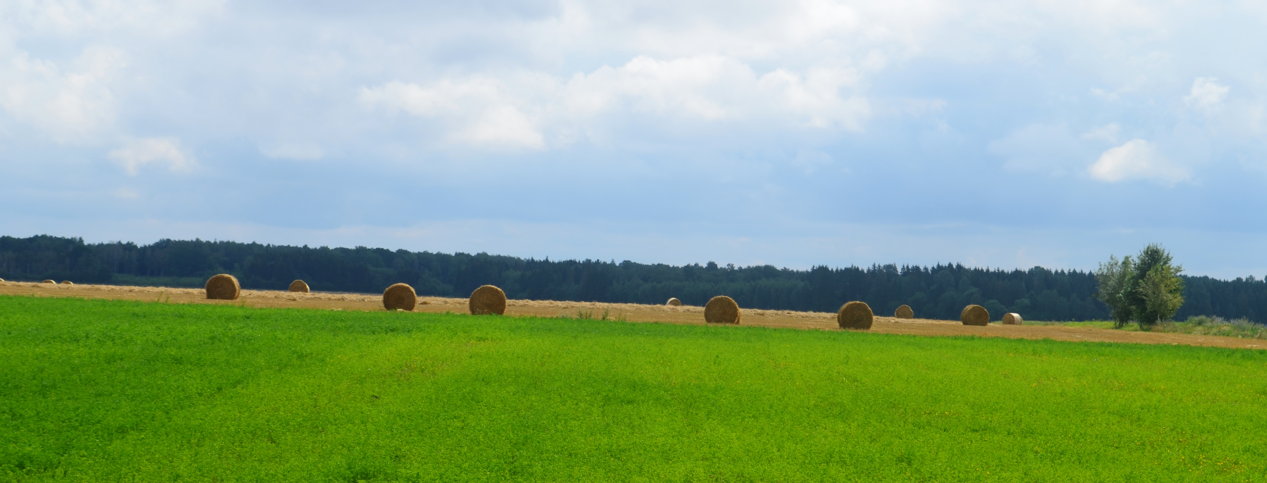 Žeimių miškas nuo Mimalių, Jonavos raj.